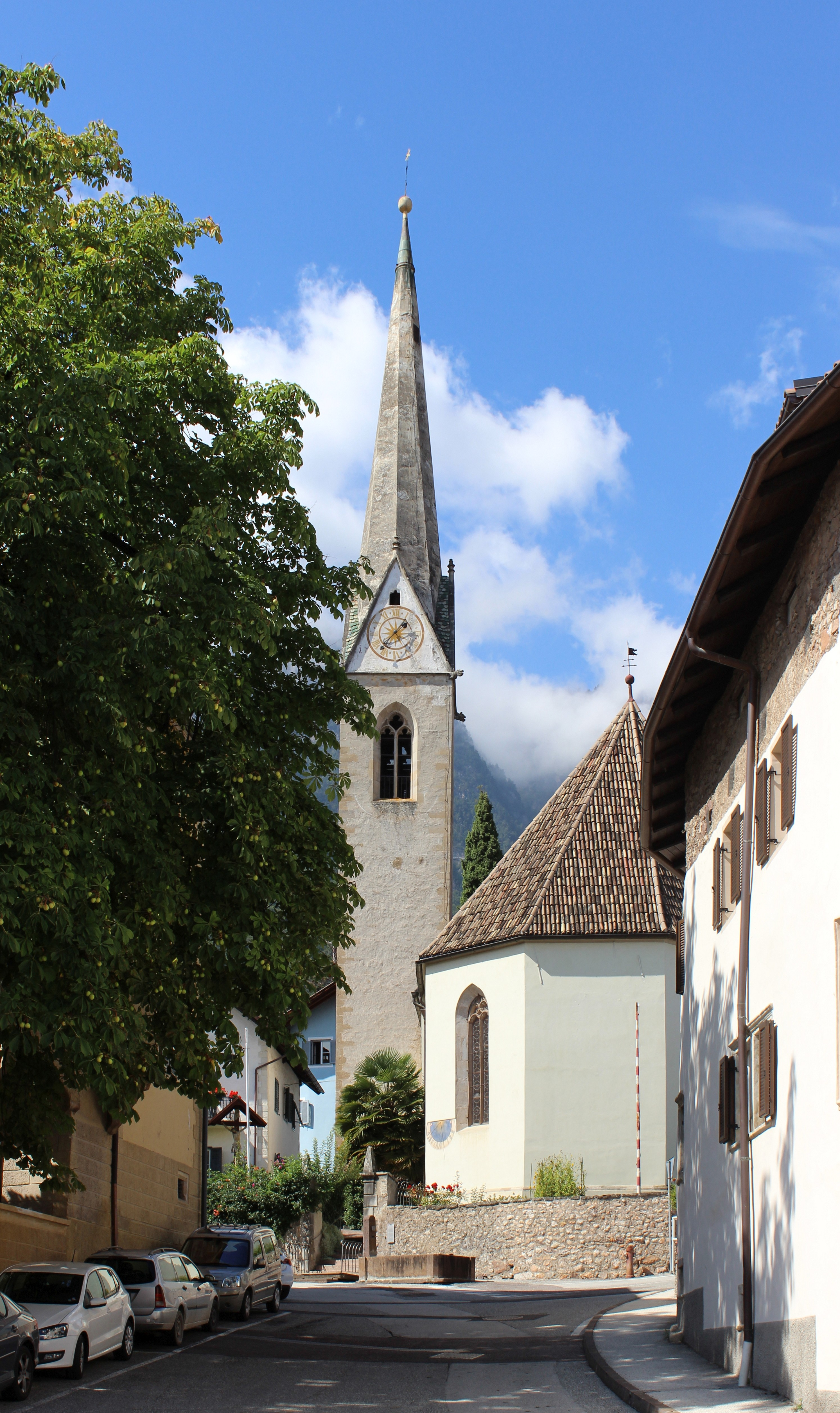 St. Katharina in Mitterdorf (Kaltern, Südtirol)